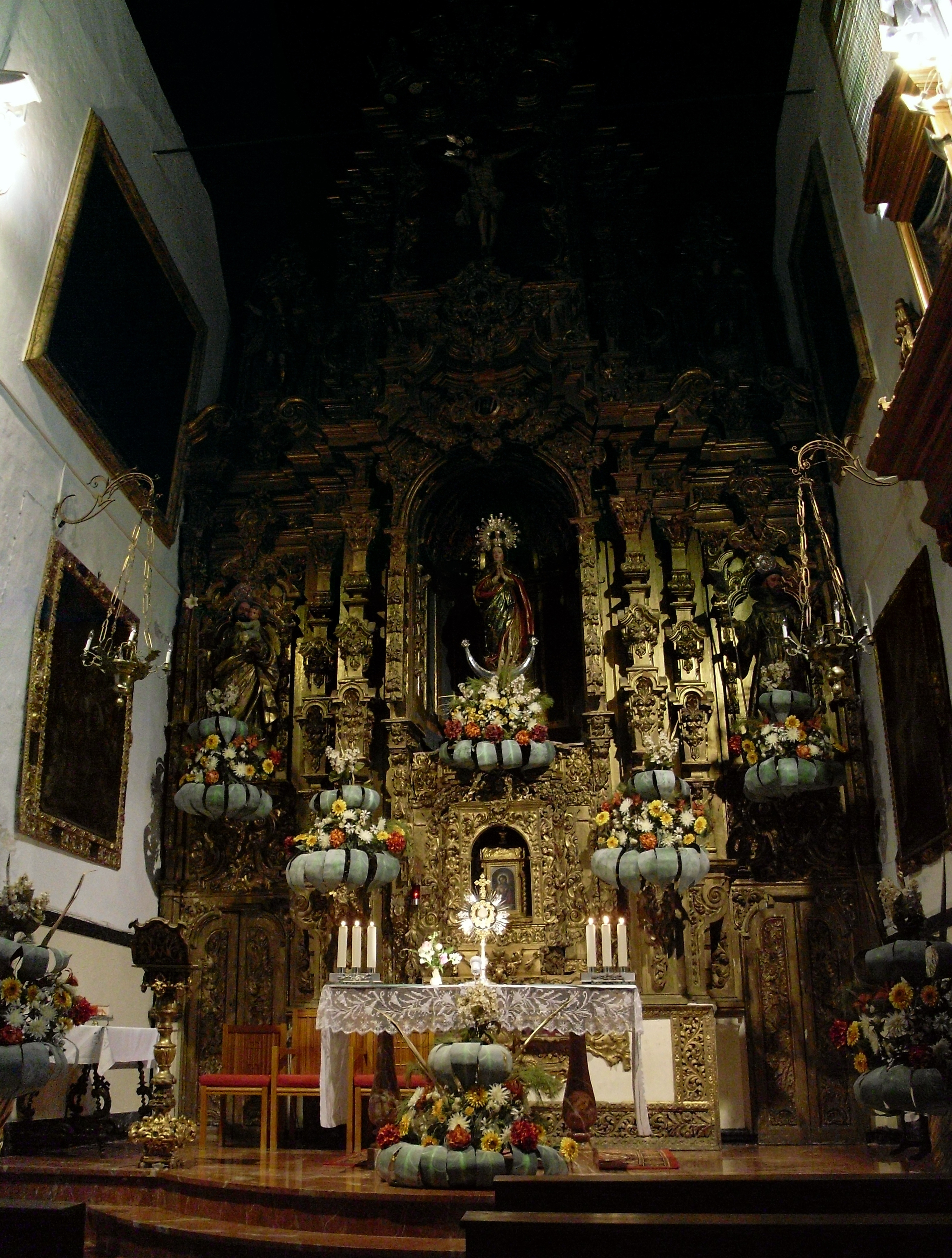 Altar mayor del Convento de la Santísima Trinidad y Purísima Concepción.